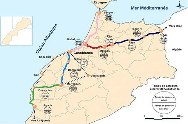 Carte Grande vitesse au Maroc